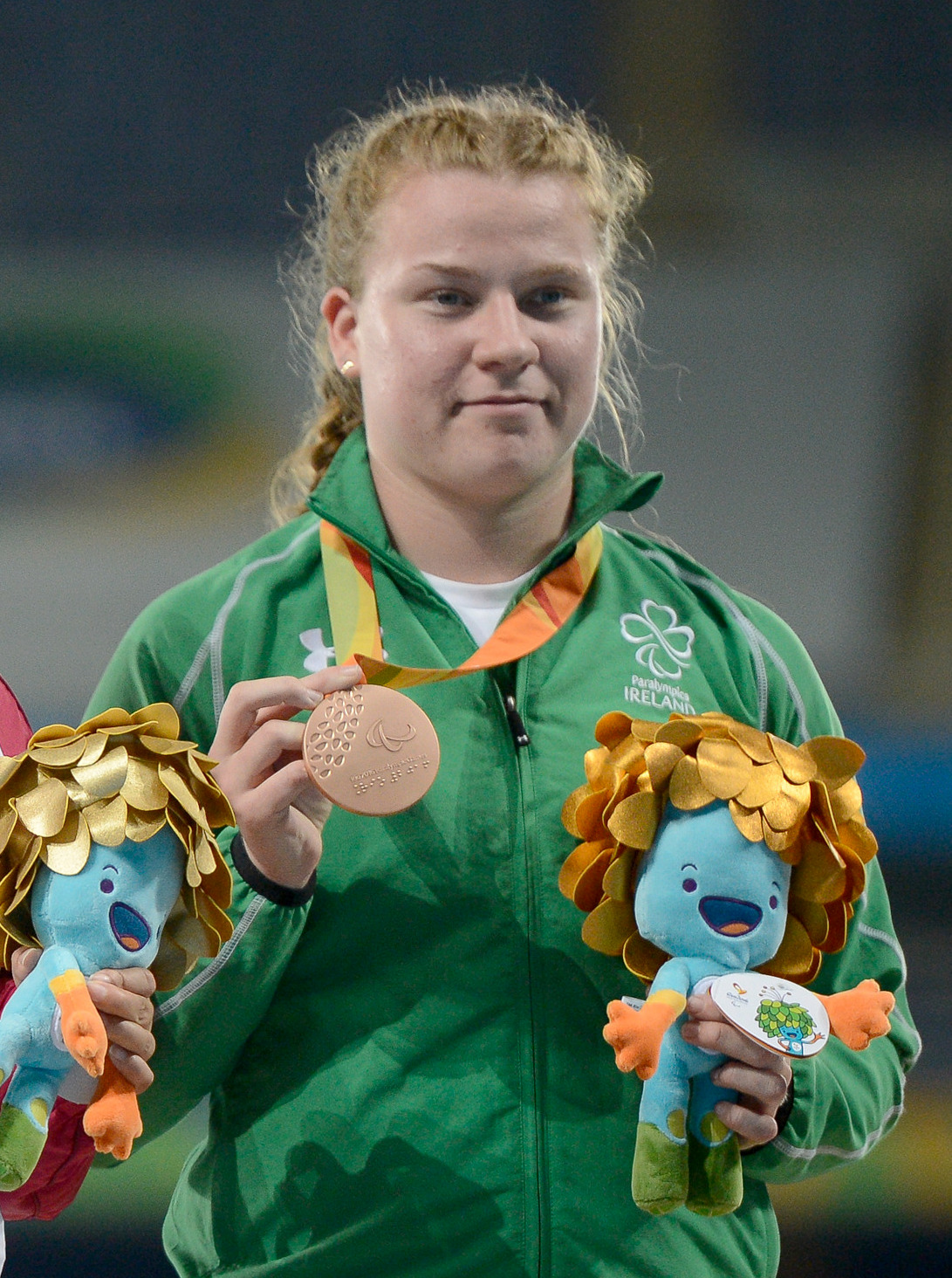 Rio de Janeiro - Noelle Lenihan leva prata no arremesso de disco F38 nos Jogos Paralmpicos Rio 2016. (Fernando Frazão/Agência Brasil)